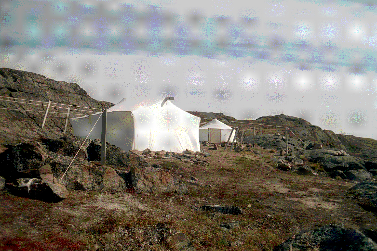 Camp Park Silvia Grinnell Iqaluit